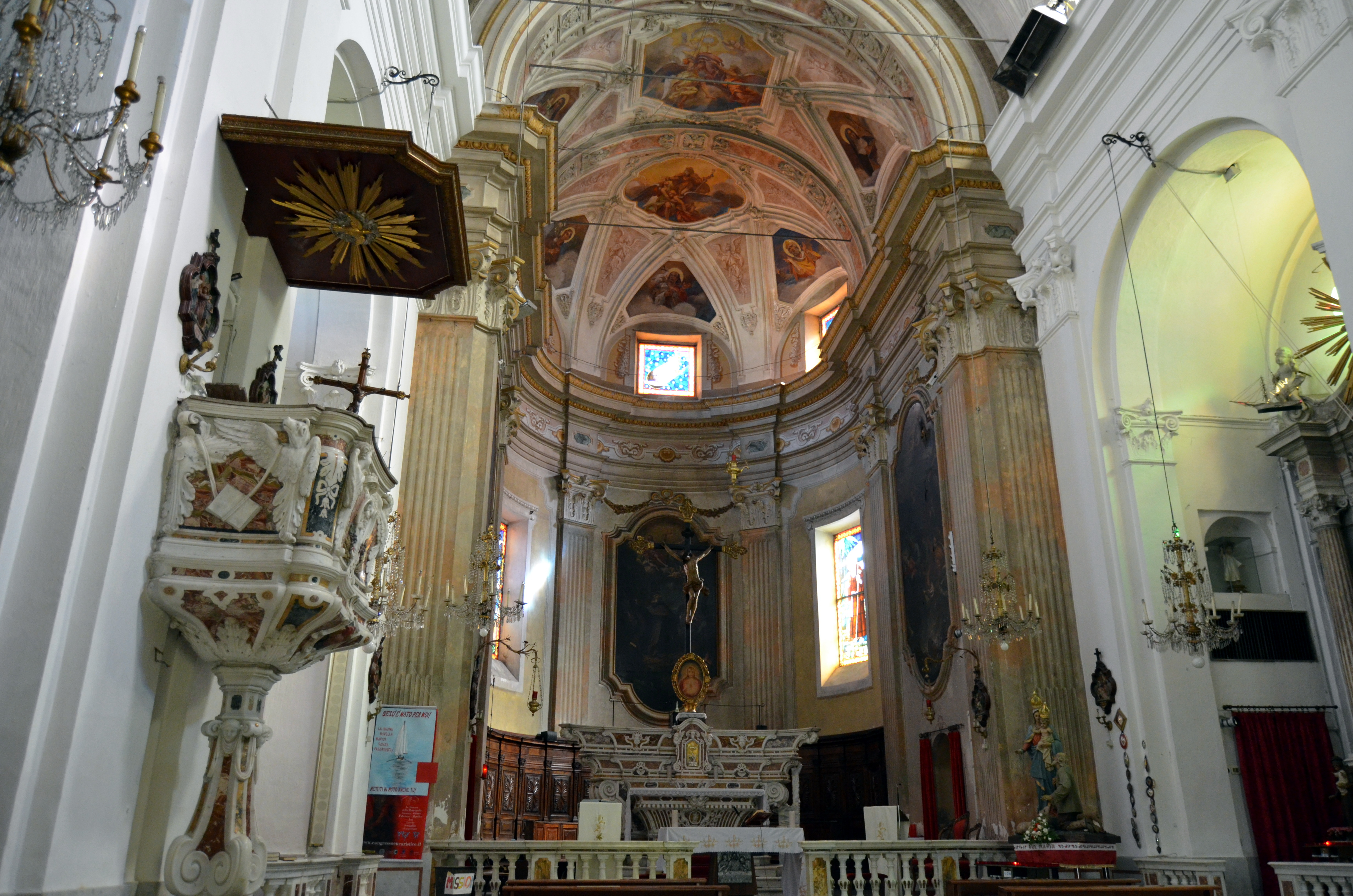 La navata della chiesa di Sant'Antonio abate, Deiva Marina, Liguria, Italia